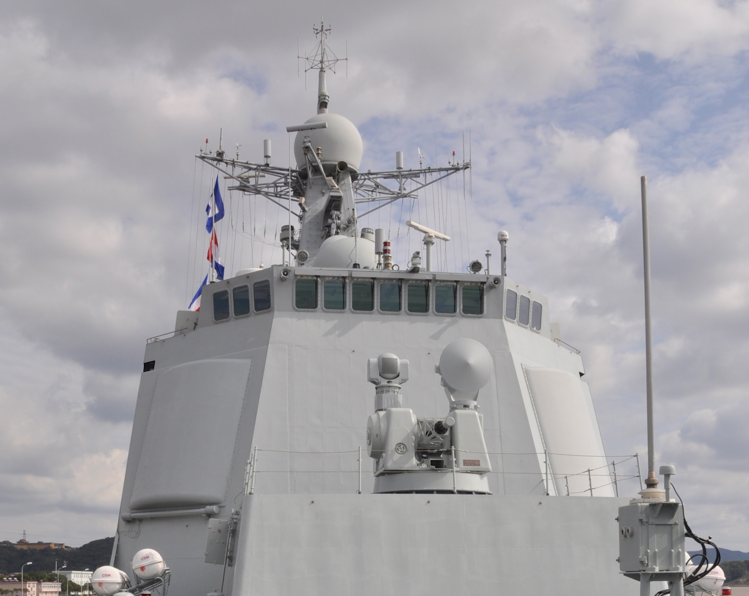 中文（中国大陆）: “长春”号导弹驱逐舰舰桥。